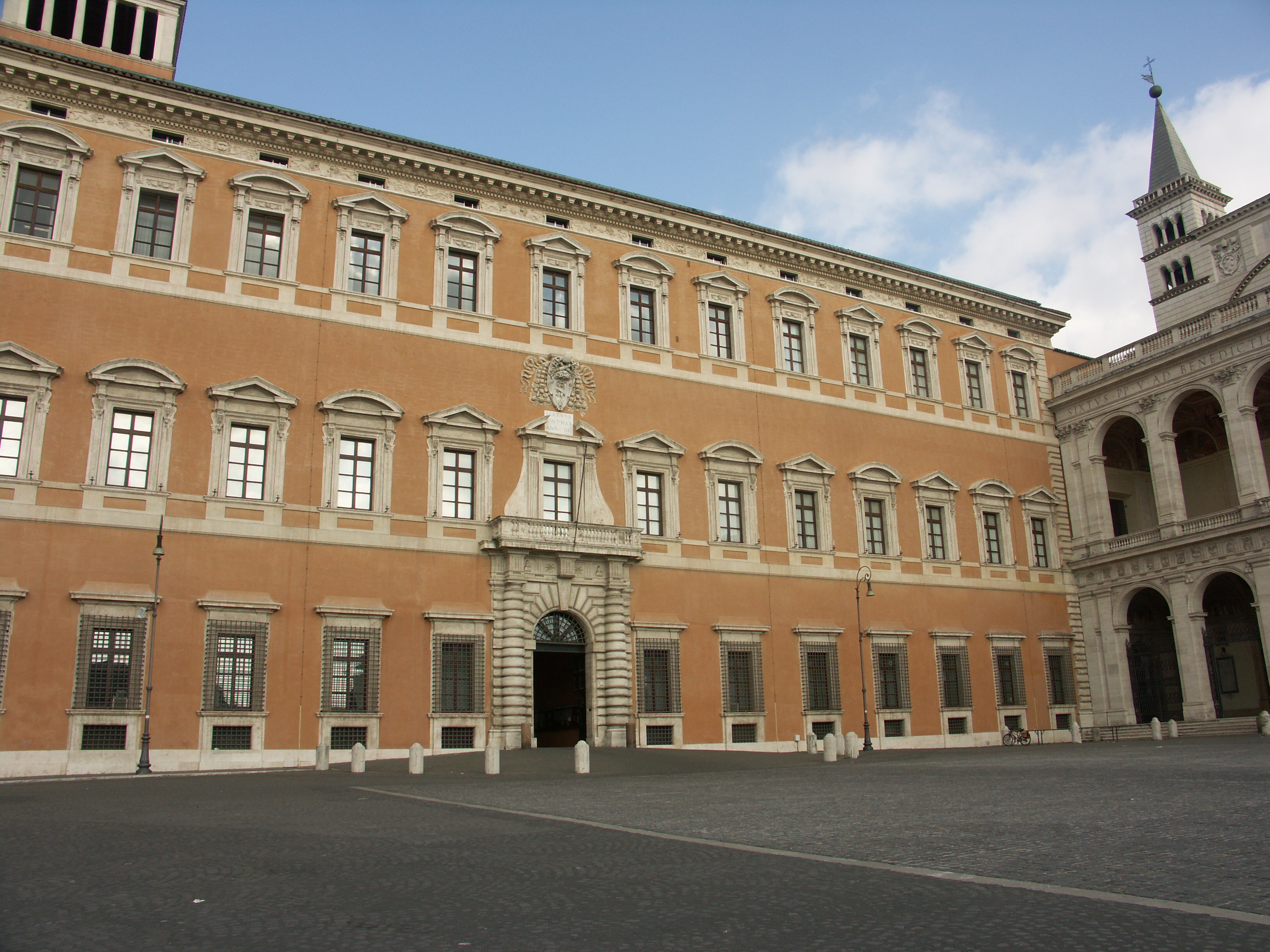 San Giovanni in Laterano, Lateranpalast